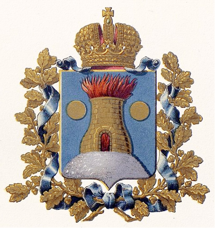 Official Russian Empire coat of arms Kelets Governorate. Герб Российской Империи Келецкой губернии в Гербовнике МВД. Утверждён Императором Всероссийским Александром Вторым.